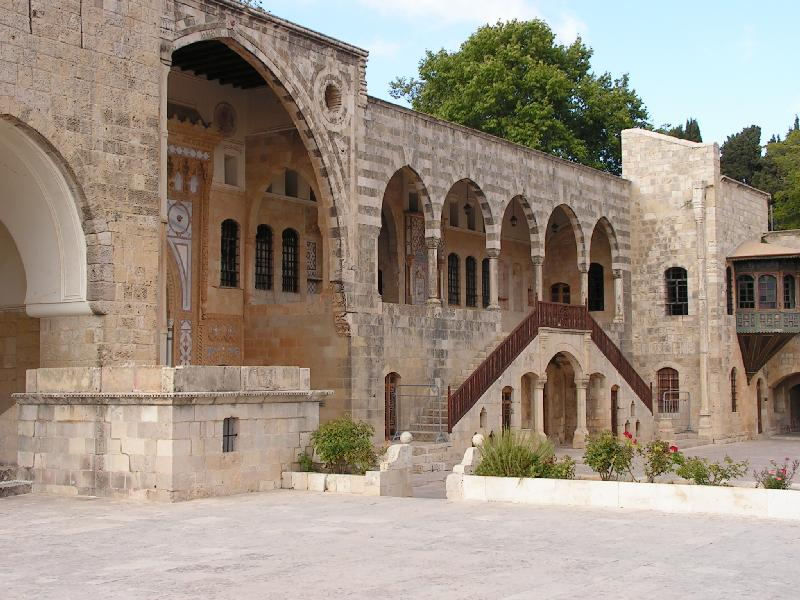 Facade of Beit El Deen Palace